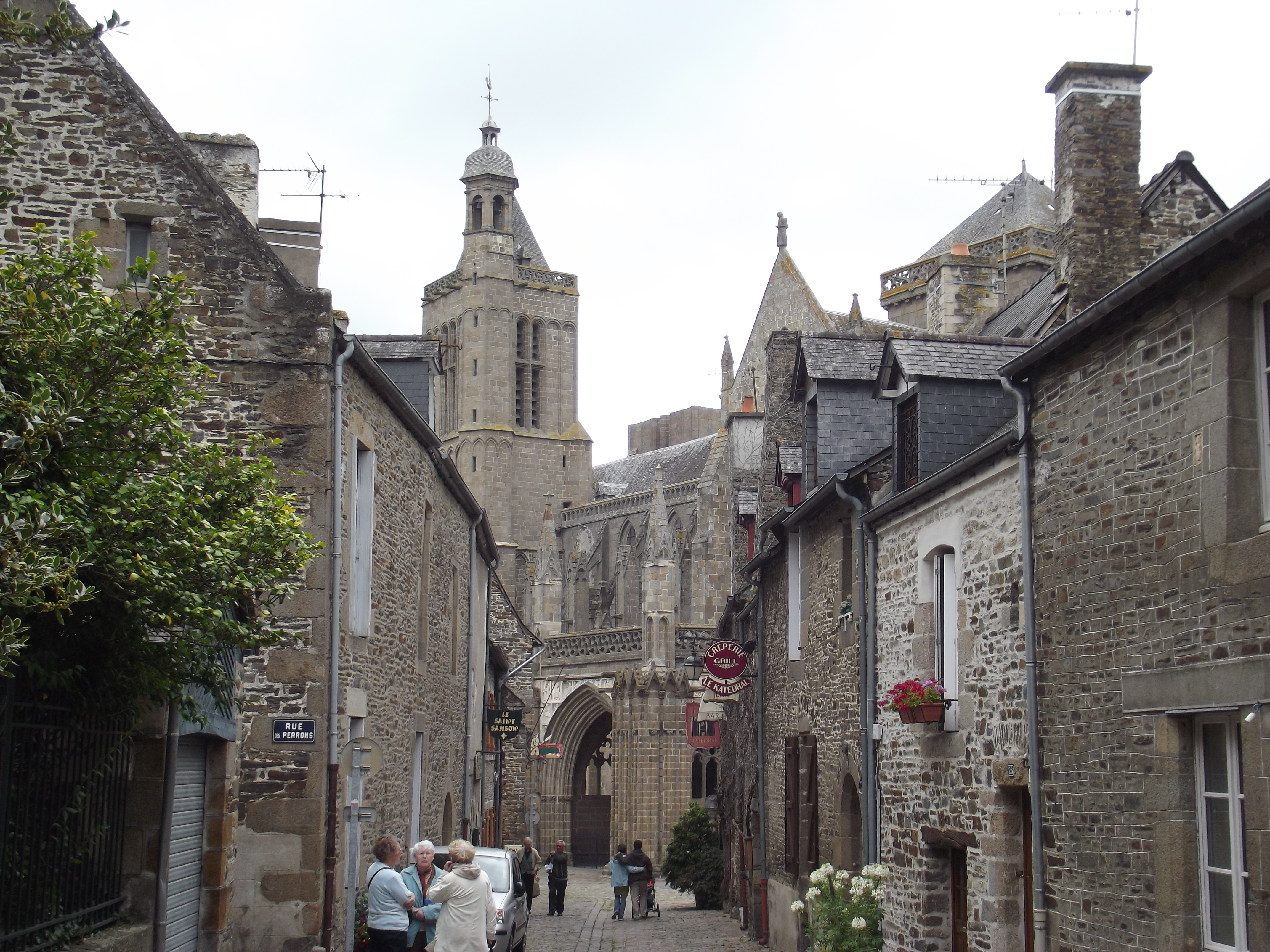 La cathédrale et la rue Ceinte à Dol-de-Bretagne (Ille-et-Vilaine), France